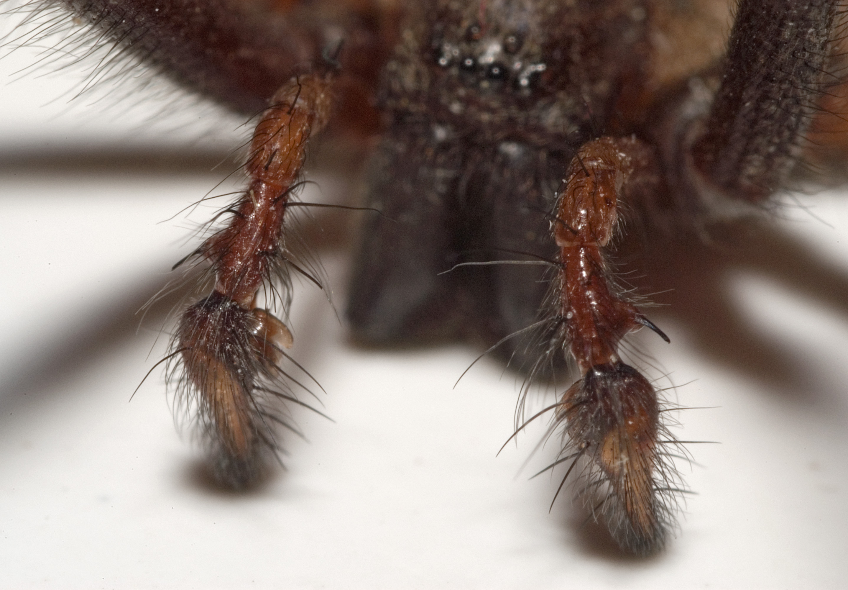 Description: pedipalpi of a male Tegenaria atrica